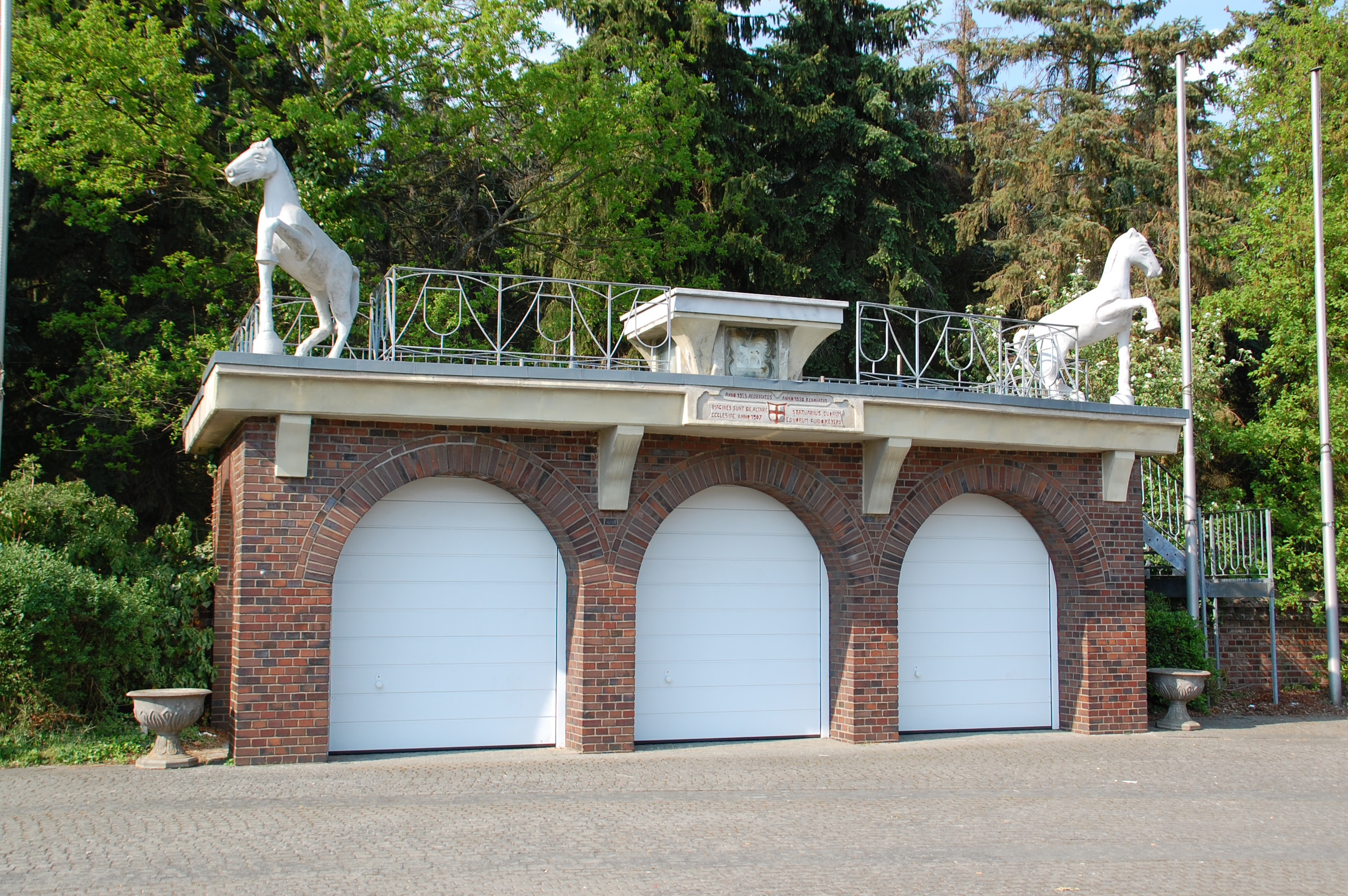 Reitertribüne in Gymnich, Germany